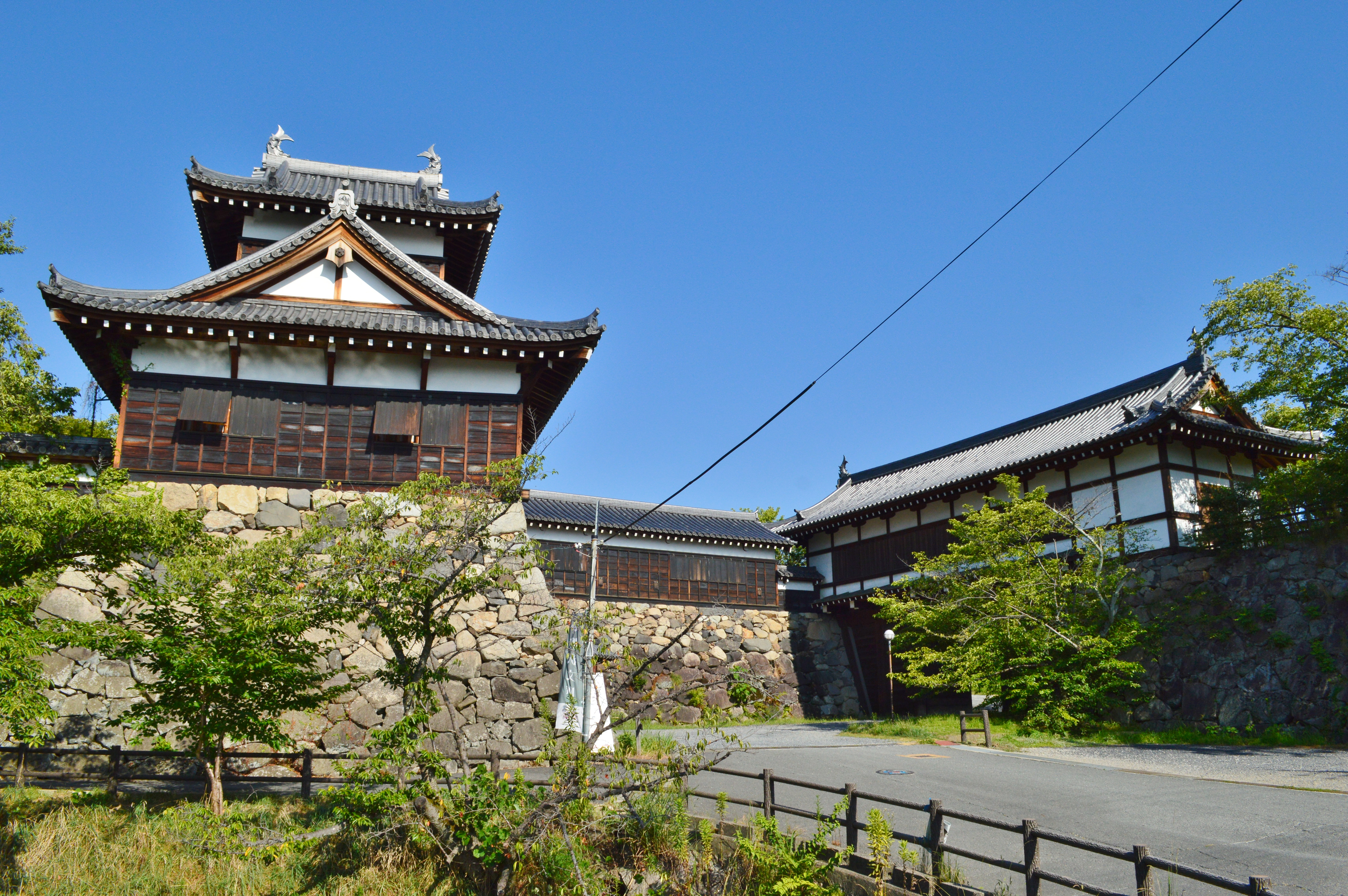 郡山城 (大和国) 追手門と追手向櫓